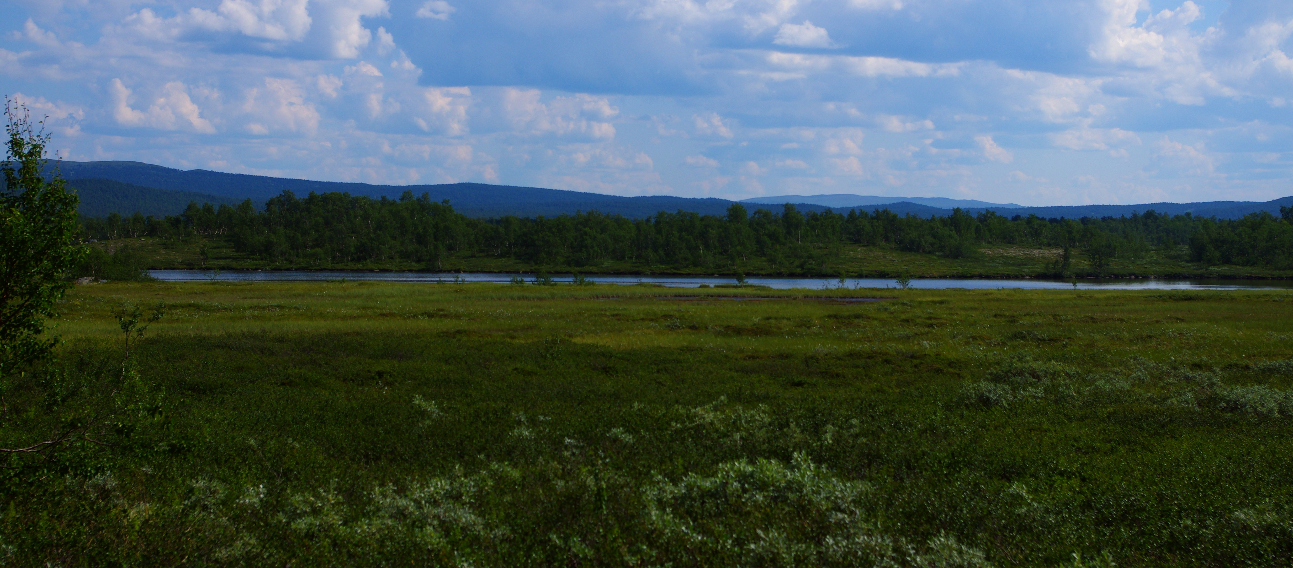 Gukkesjaure eller Guhkiesjávrre är en sjö i Sorsele kommun i Lappland i Sverige. Kungsleden passerar sjön.